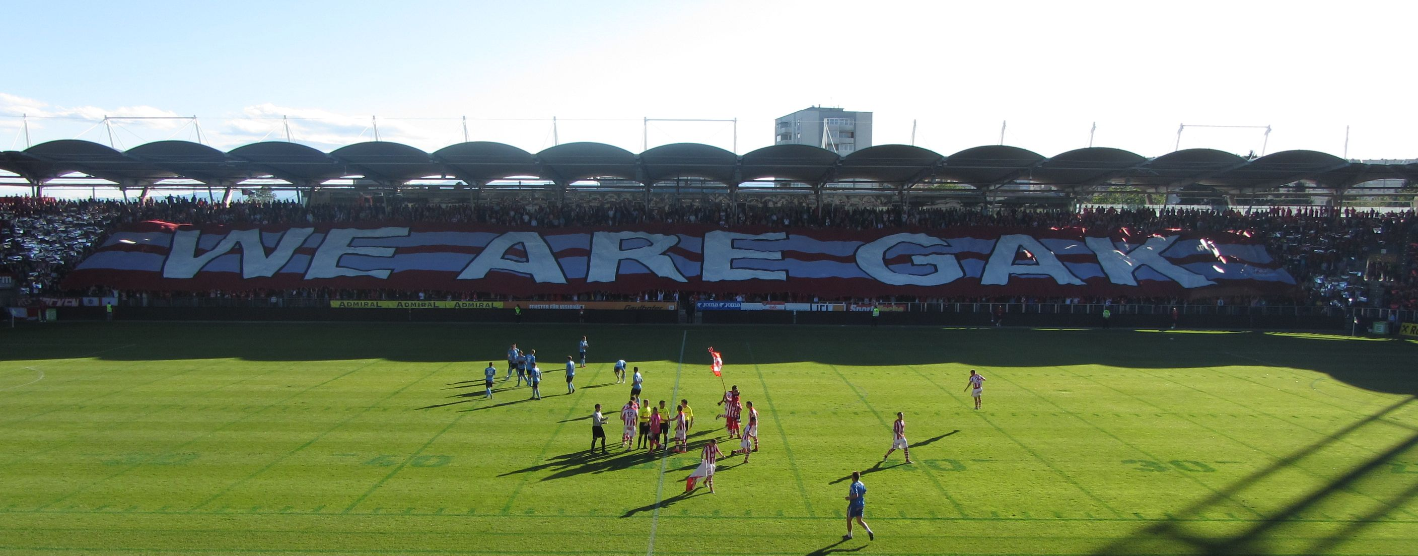 vor dem Ankick des ersten Relegationsspiels GAK - Hartberg